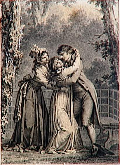 Illustration pour Julie ou la nouvelle Héloïse, de Jean-Jacques Rousseau).